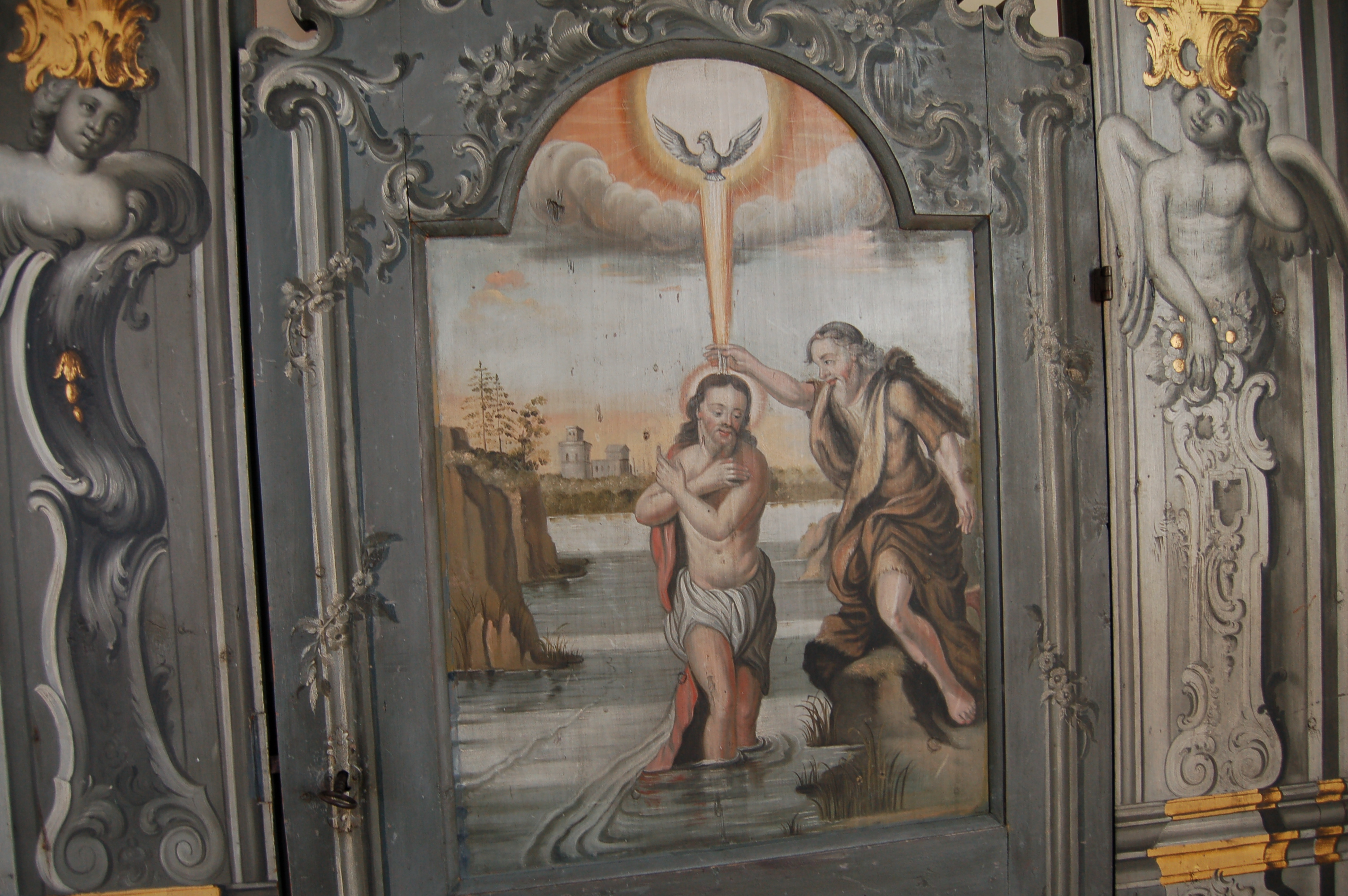 Detalj dåpshuset Tjølling kirke, Larvik